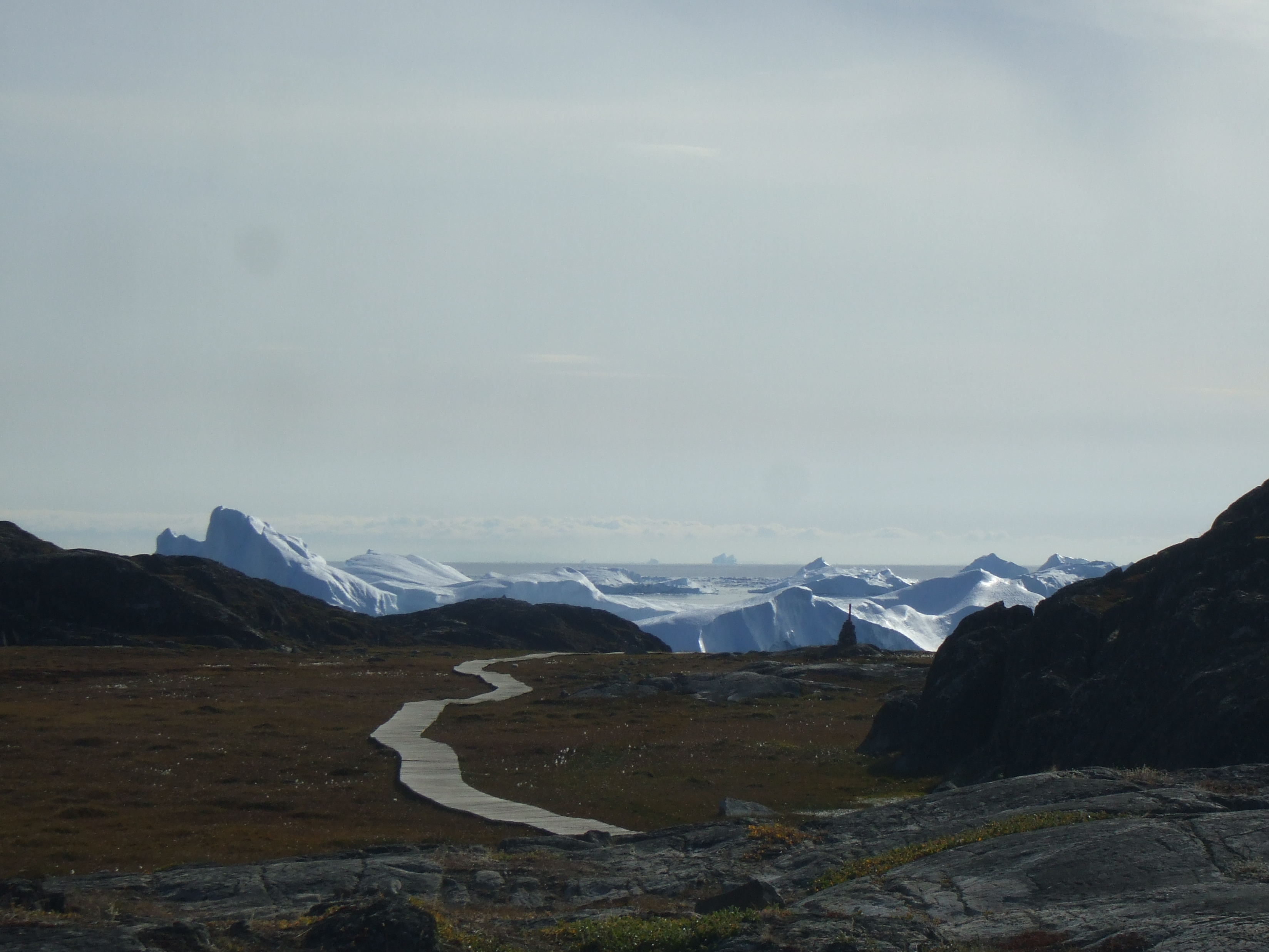 Ilulissat 3 icebergs Groenland 2009 Expédition ACarré